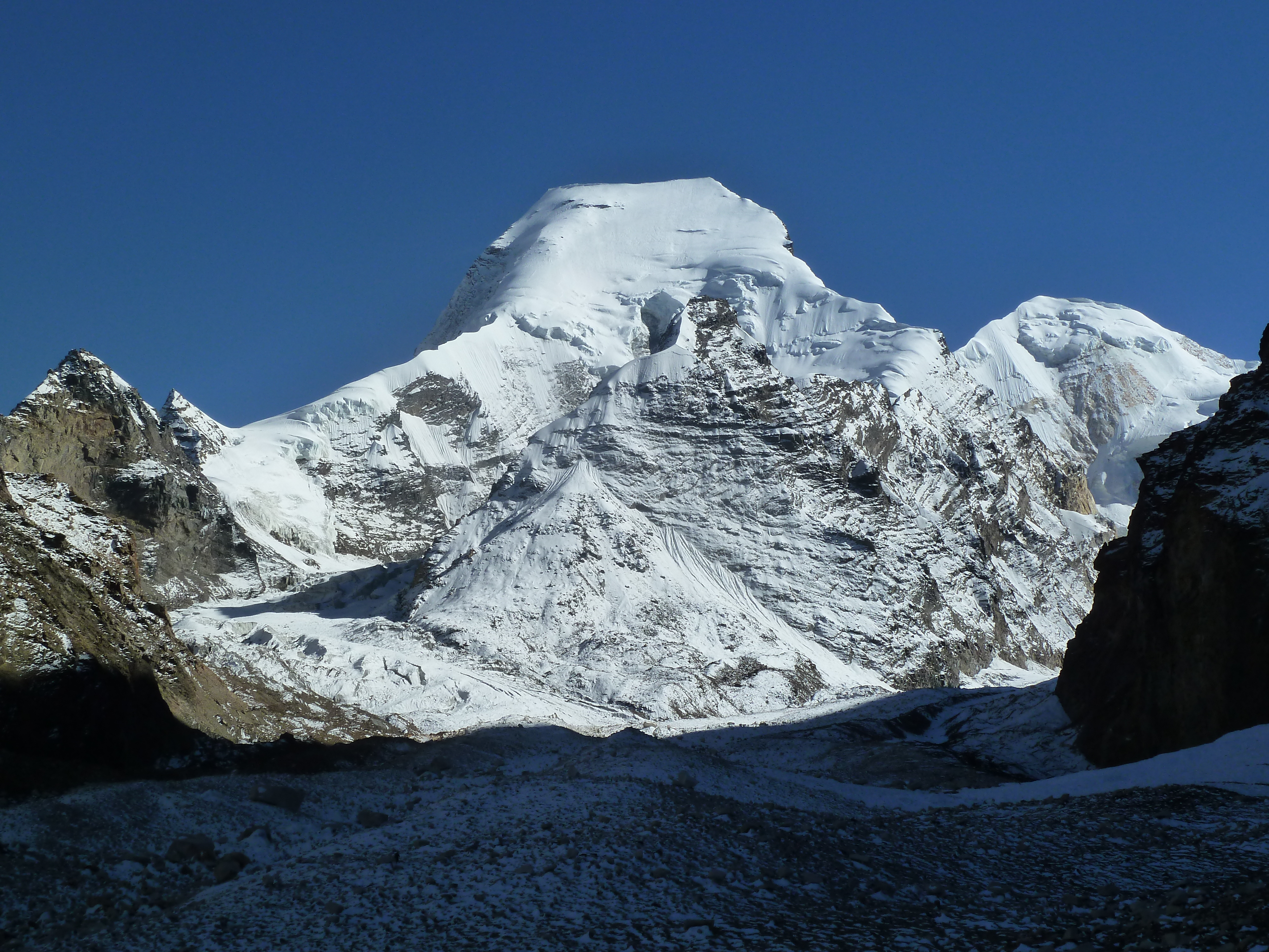 Satopanth cestou do CI